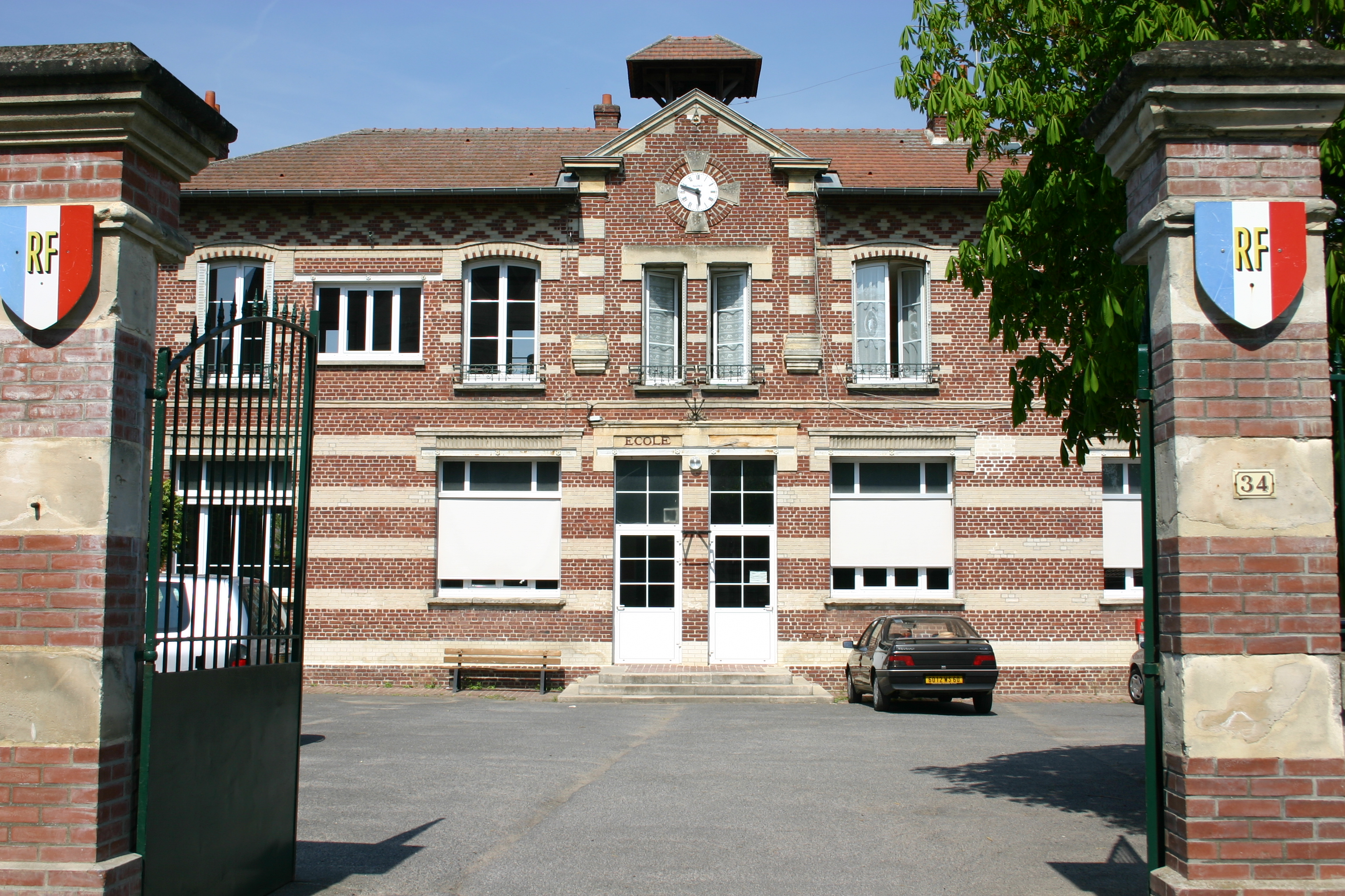 Mairie d'Angicourt